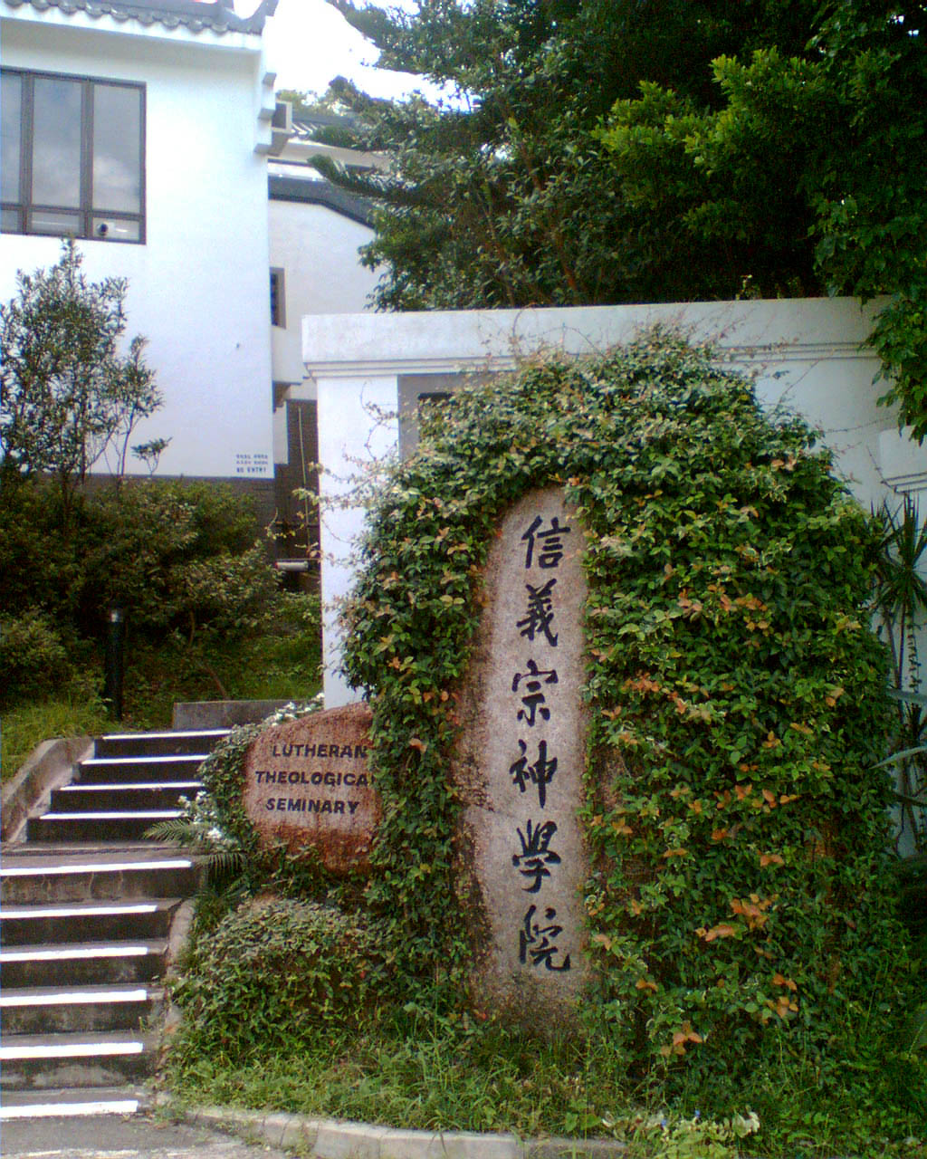 神學院名牌